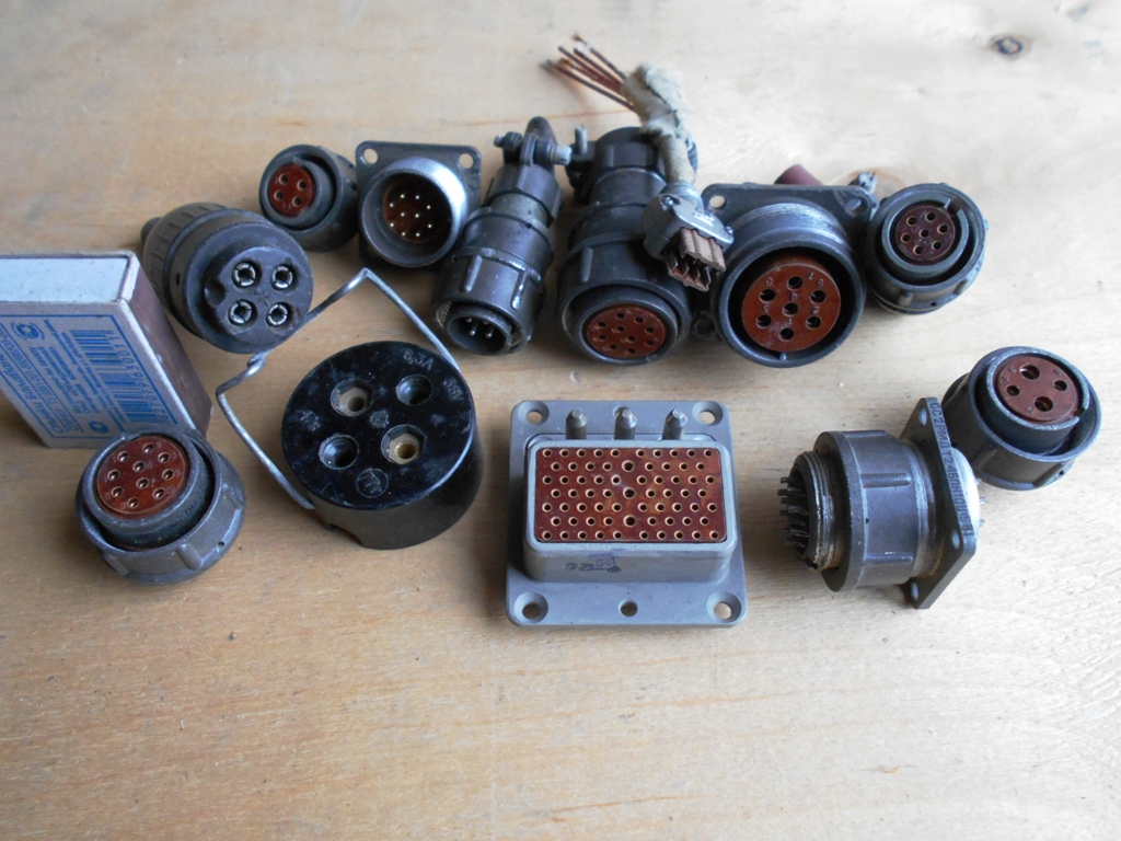 Авиационные штепсельные разъёмы и соединители